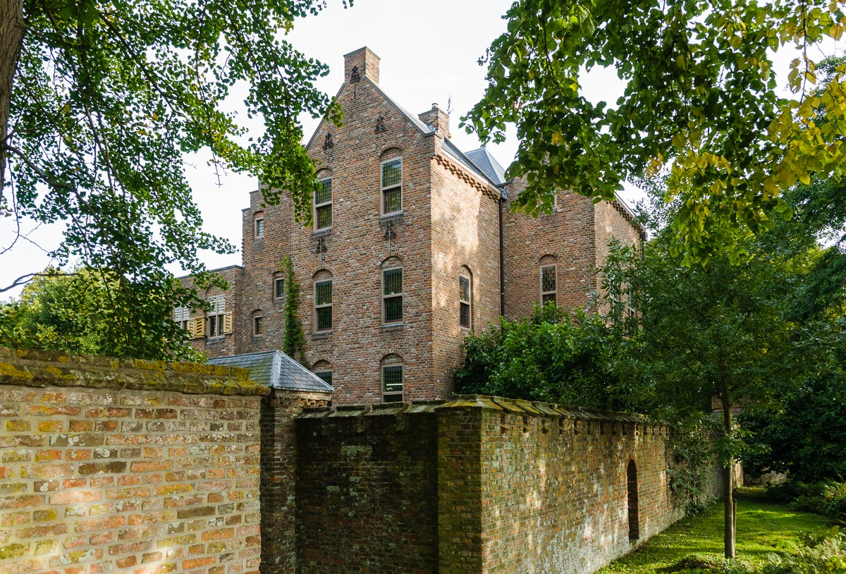 Sypestein, Nieuw Loosdrecht, Wijdemeren, Noord Holland, Nederland.